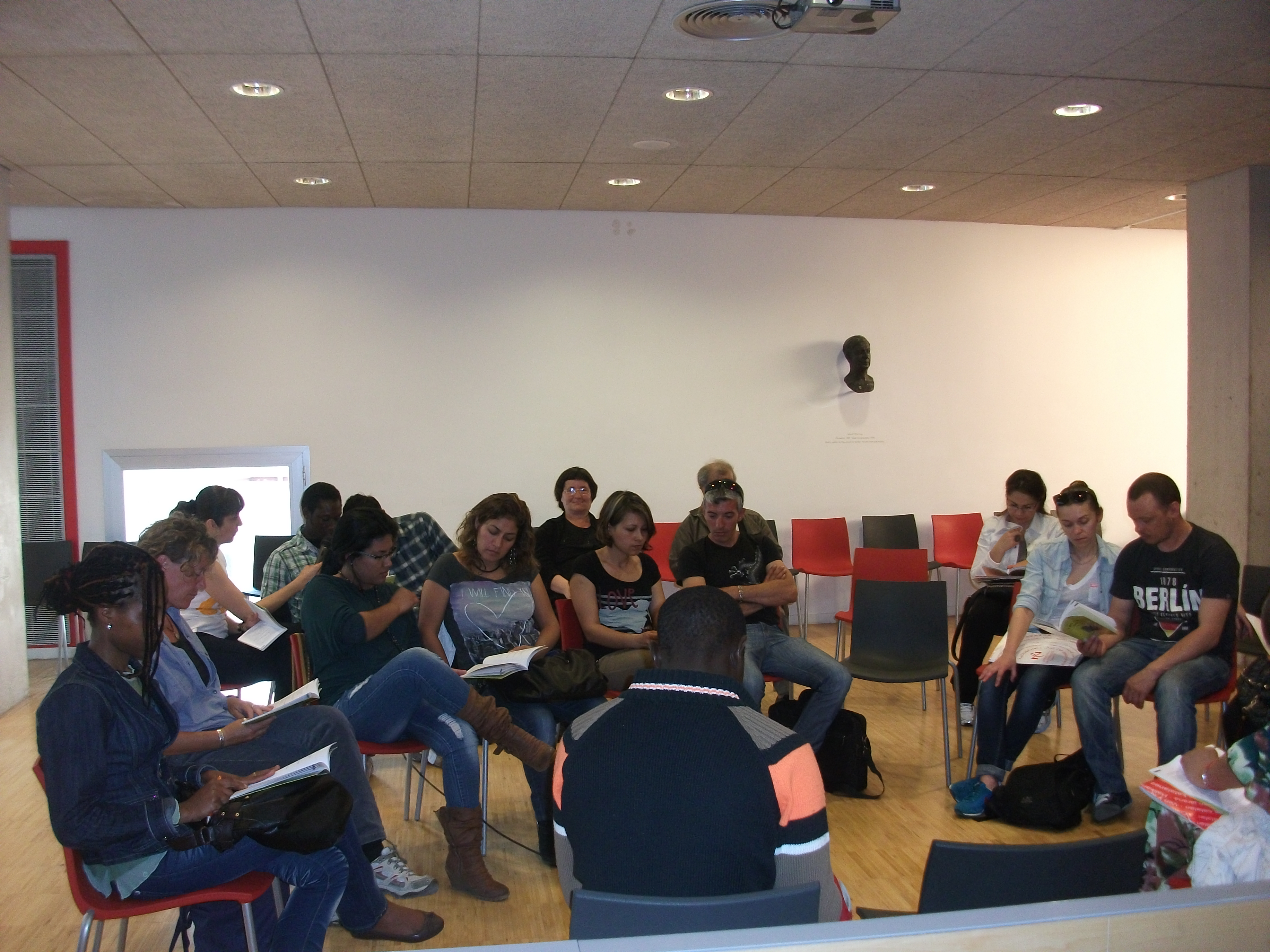 How can reading texts easy to work with learners and students of Catalan for adults to improve their language skills?